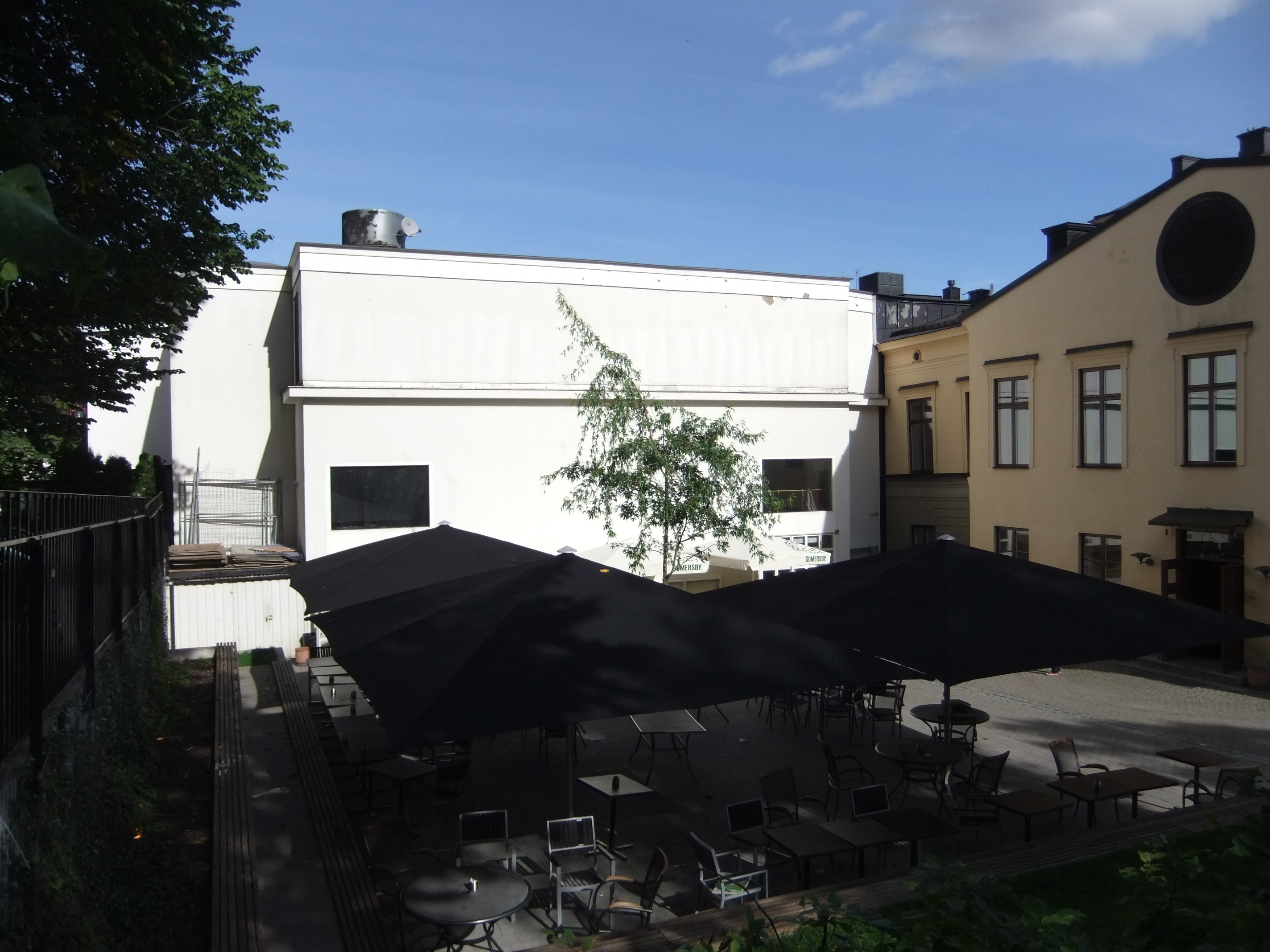 Stockholms nation, Uppsala. Peter Celsings tillbyggnad från 1968, sedd från gården.